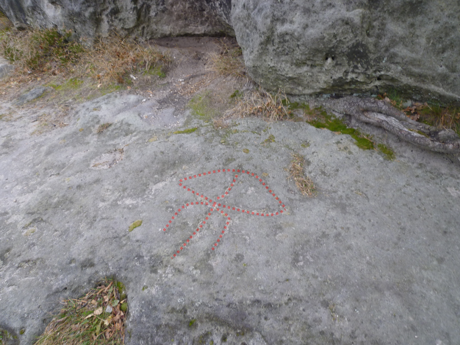 Winterstein, in den Boden geritzte Armbrust (rot markiert)